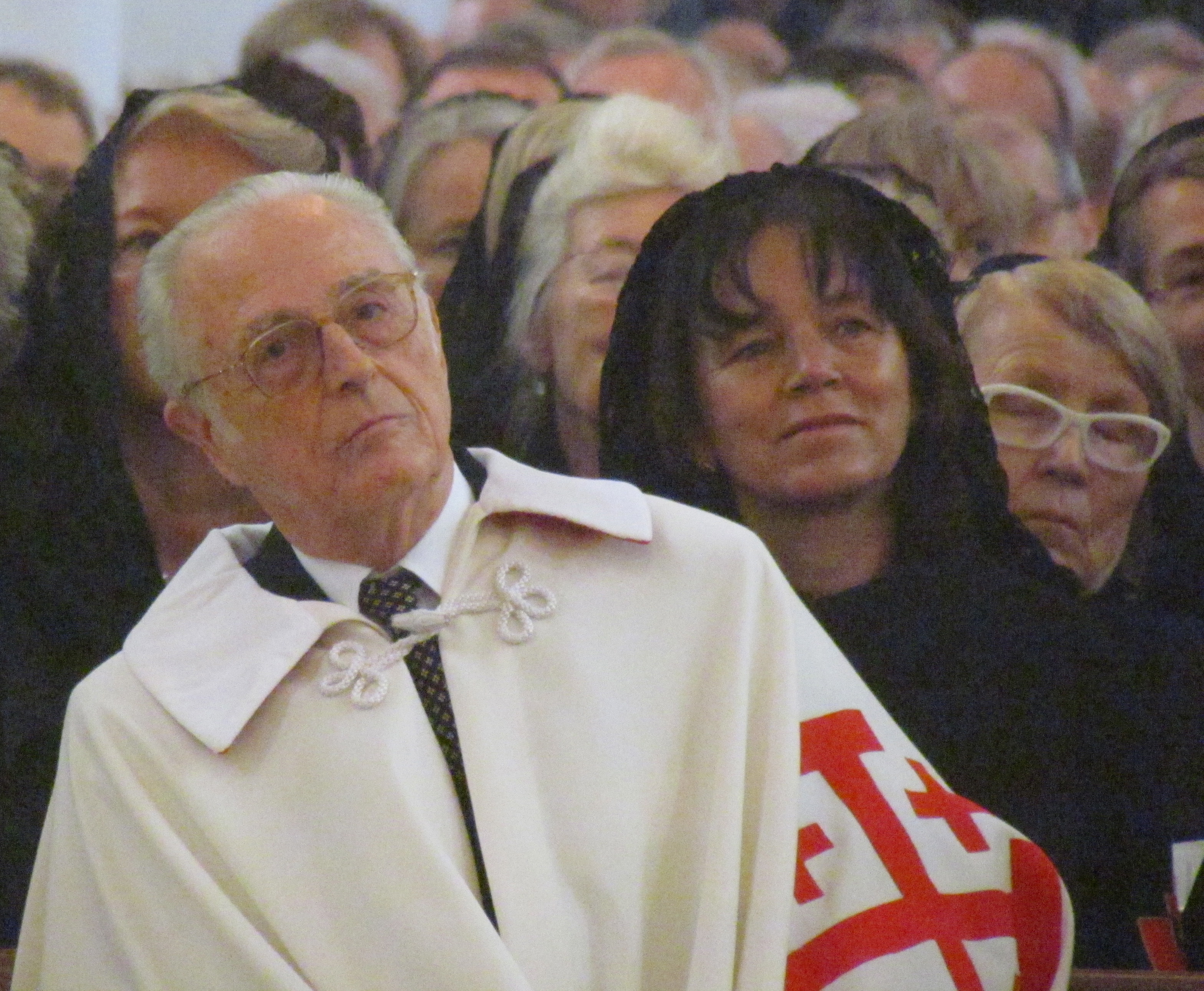 Franz Herzog von Bayern (Investitur des Ritterorden vom Heiligen Grab zu Jerusalem, München)